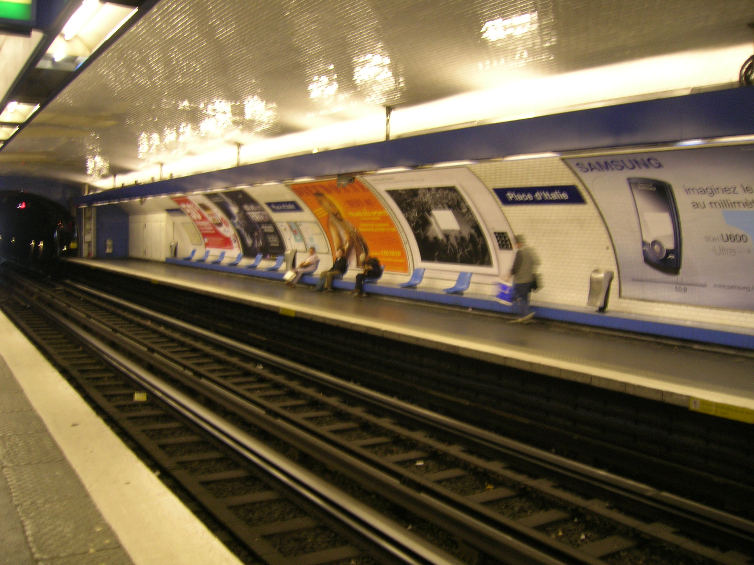 Quais de la station Place d'Italie ligne 6, Paris